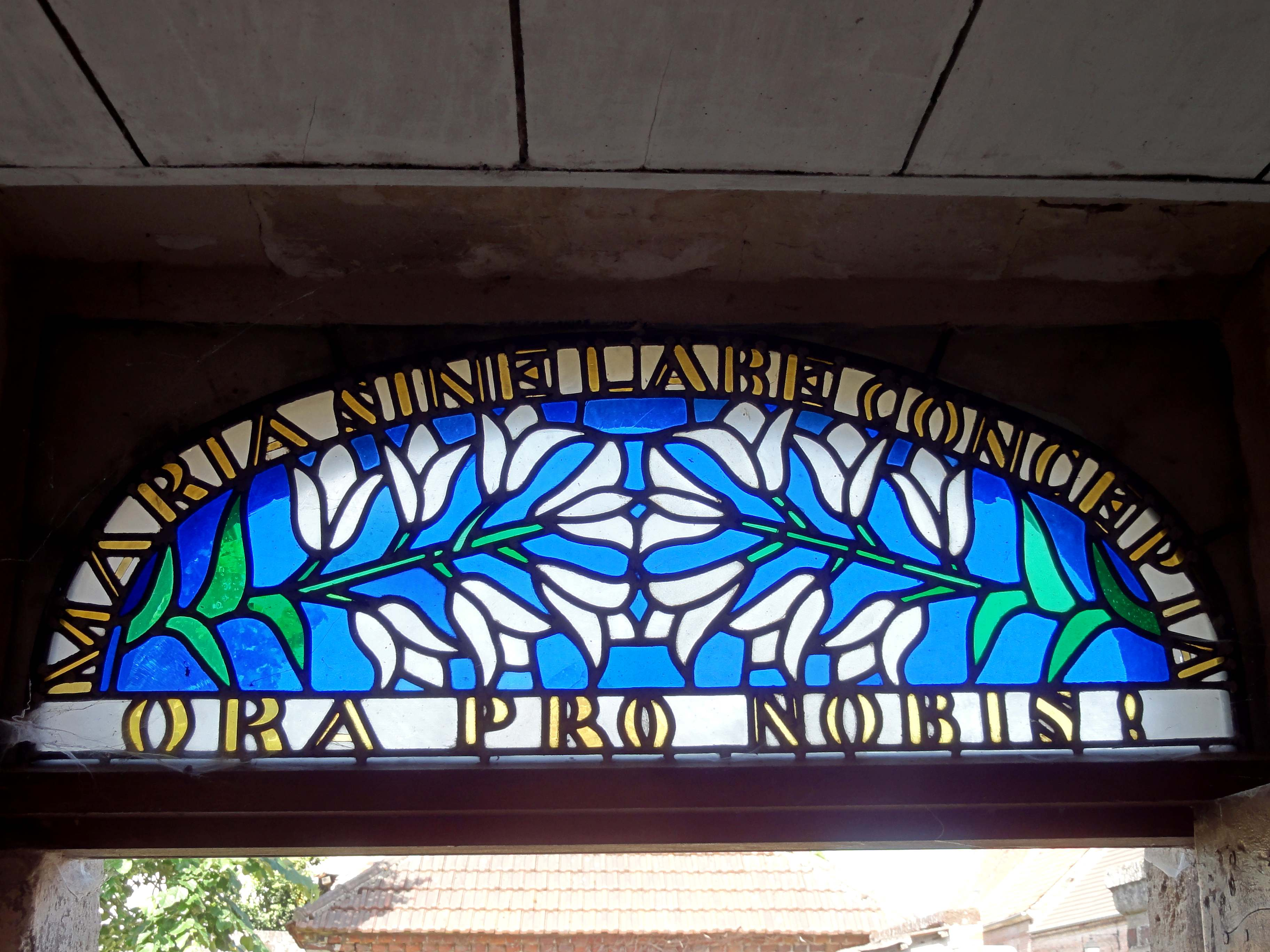 Verrière n° 15 (tympan du portail latéral), Immaculée-Conception, réalisée en 1856 par l'abbé Théodore-Cyrille Deligny (Francières 1808 - Compiègne 1887), curé de Jonquières de 1834 à 1861. Représentation : fleurs de lys symbolisant la pureté, inscription traduite du latin : « Ô Marie conçue sans péché, prie pour nous [qui avons recours à toi] ».